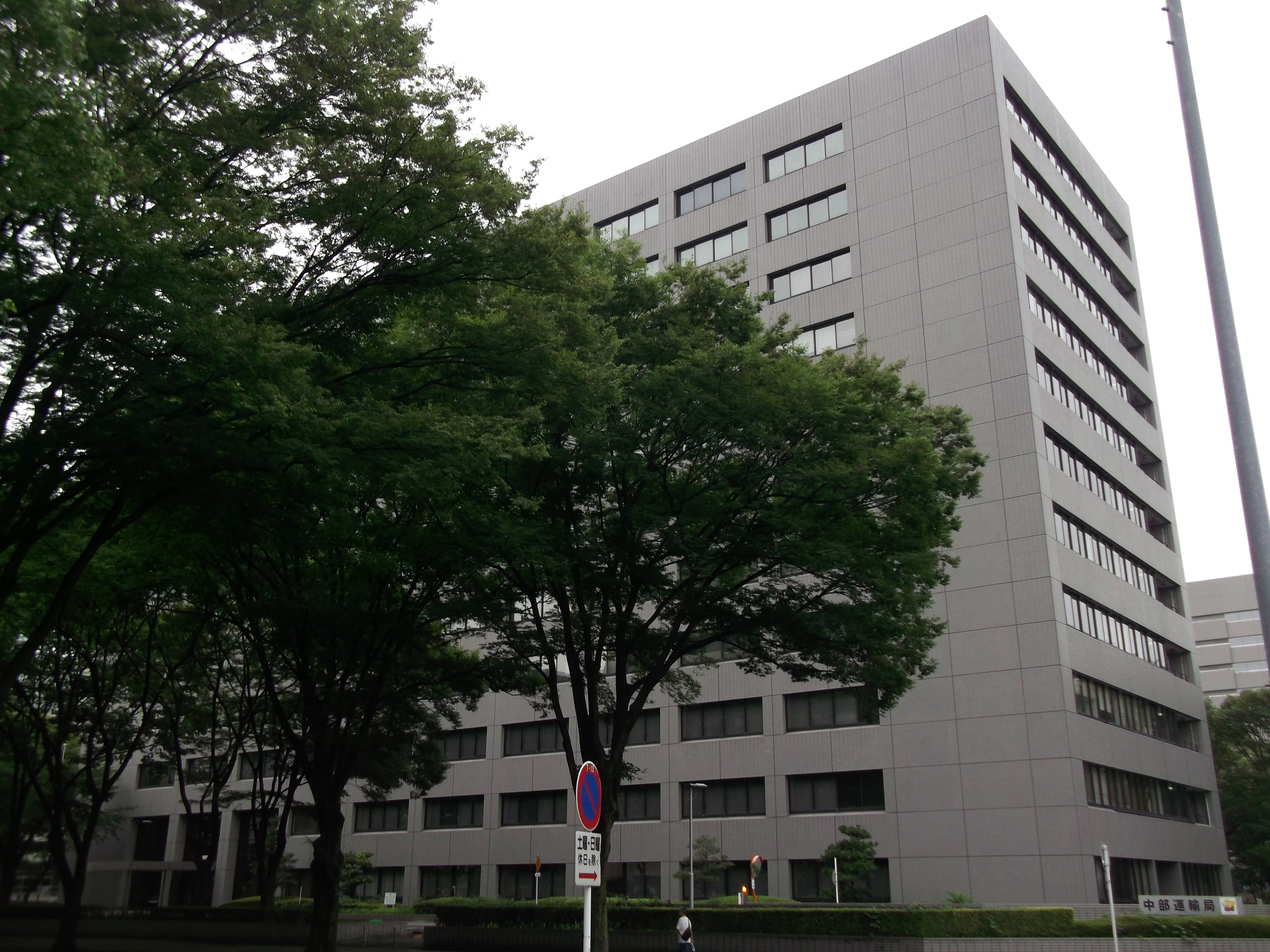 名古屋市中区の名古屋合同庁舎第1号館を北側公道東側より撮影（名古屋法務局、中部運輸局、東海防衛支局、この他東海北陸厚生局の移転計画があり）